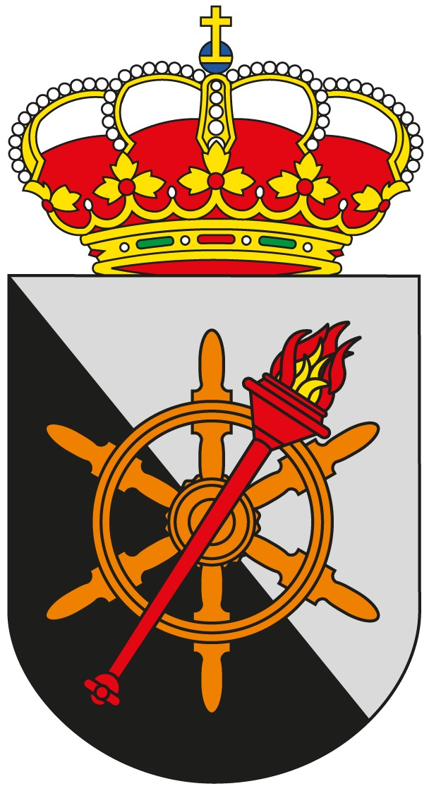 Escudo del Centro de Sociología